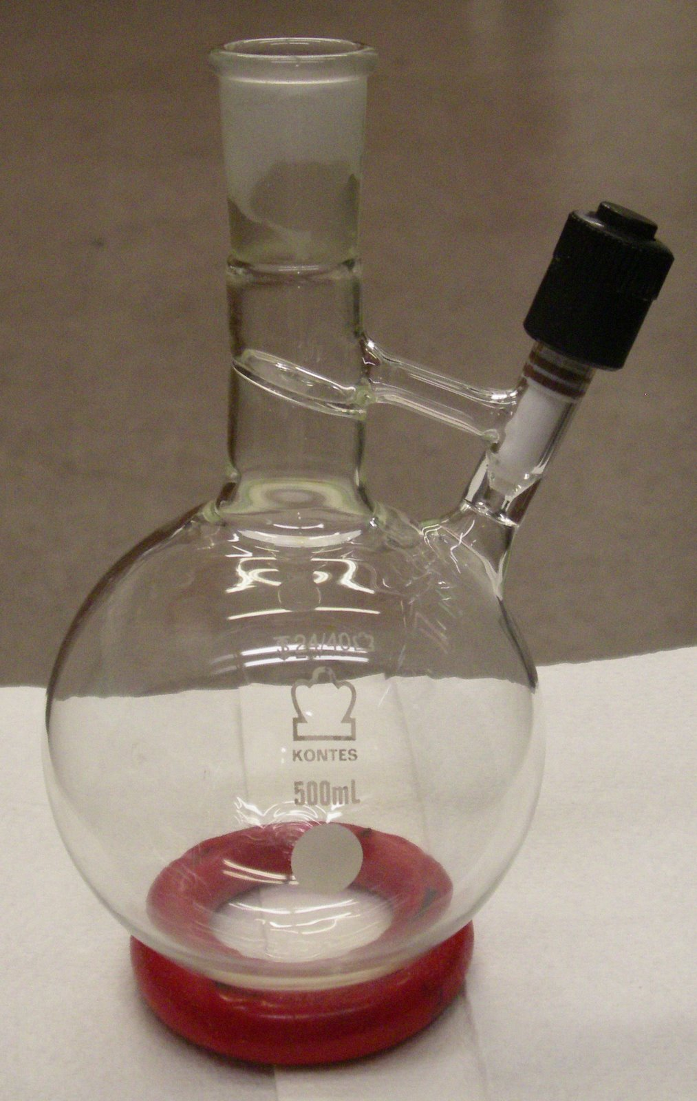 Straus flask